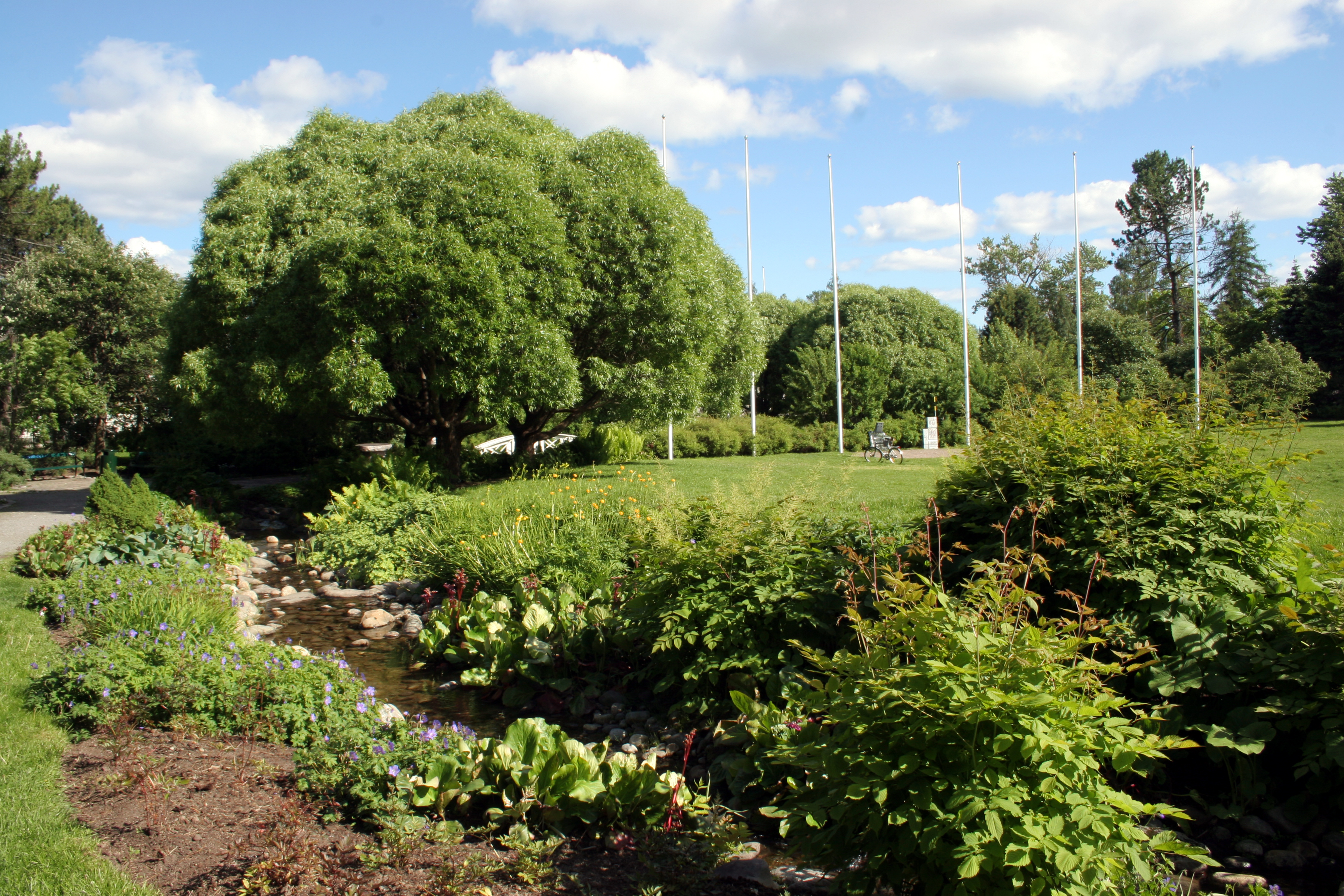 Vänortsparken, Umeå, Sweden.